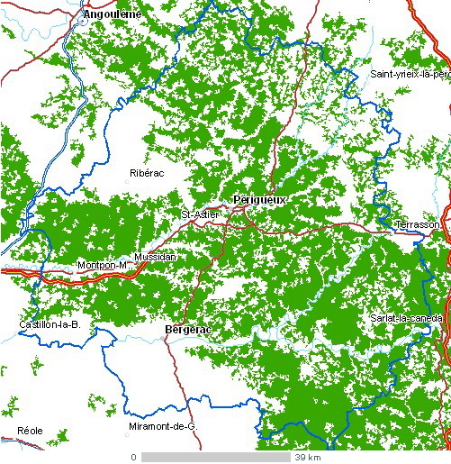 Carte du département Dordogne Légende